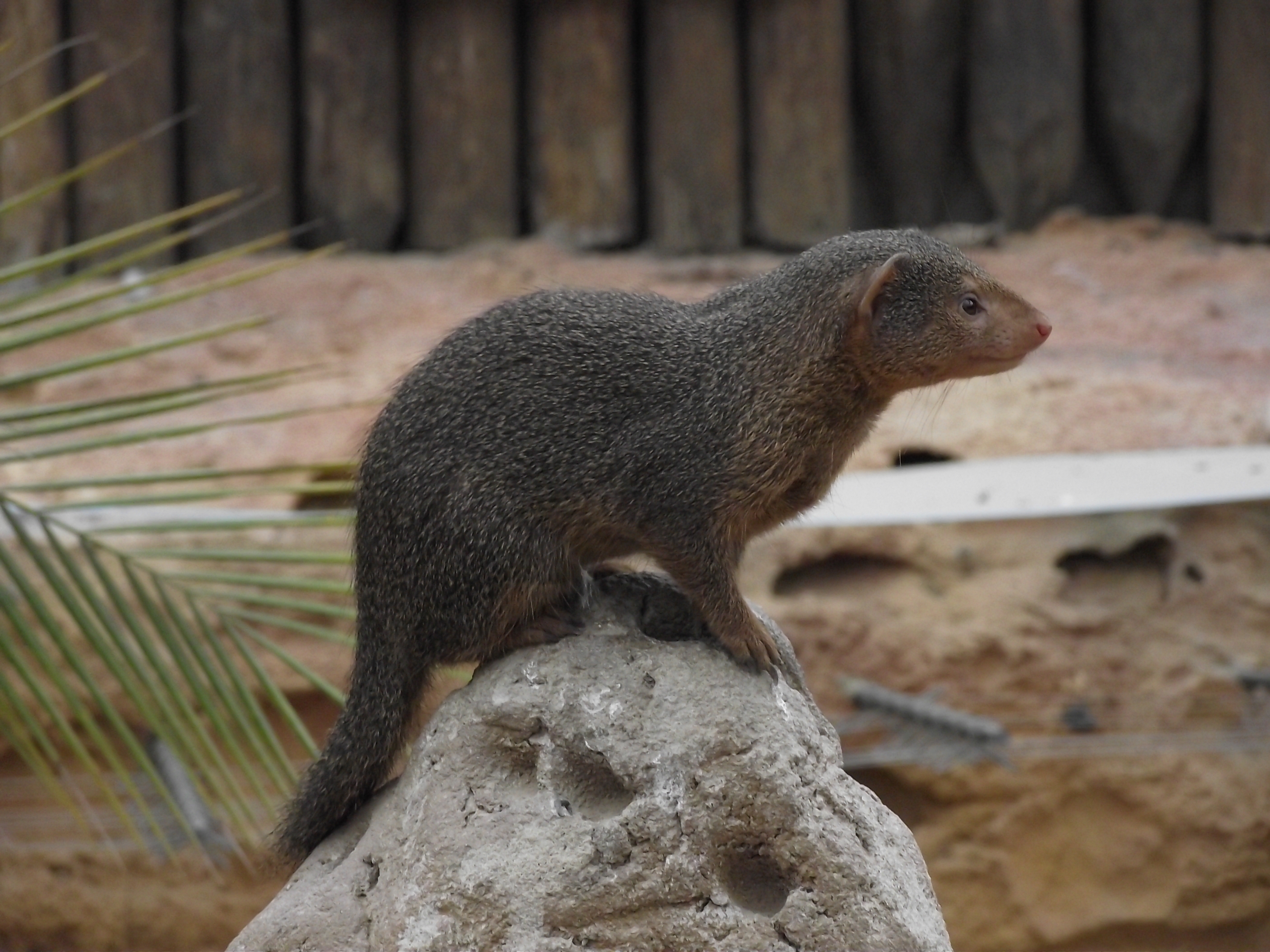 Mangouste à Pairi Daiza